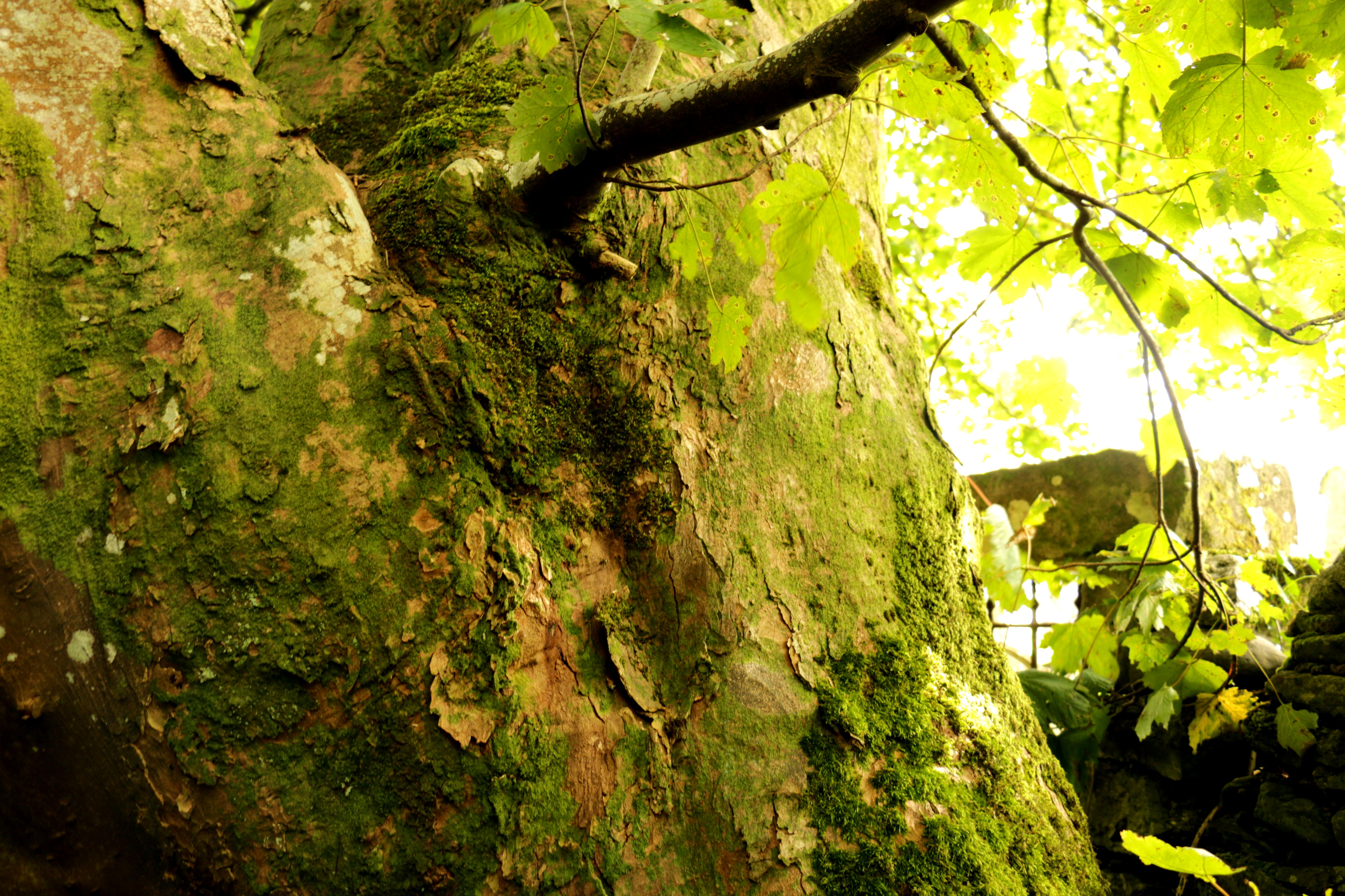 Bergahorn in Schlucht bei Kilmun (Schottland).